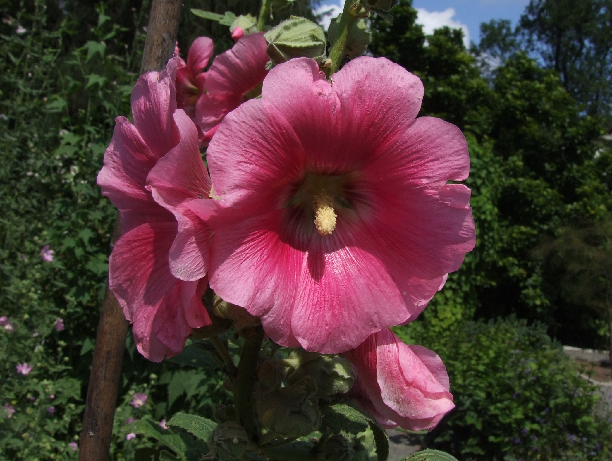 Alcea rosea (pl. malwa różowa)